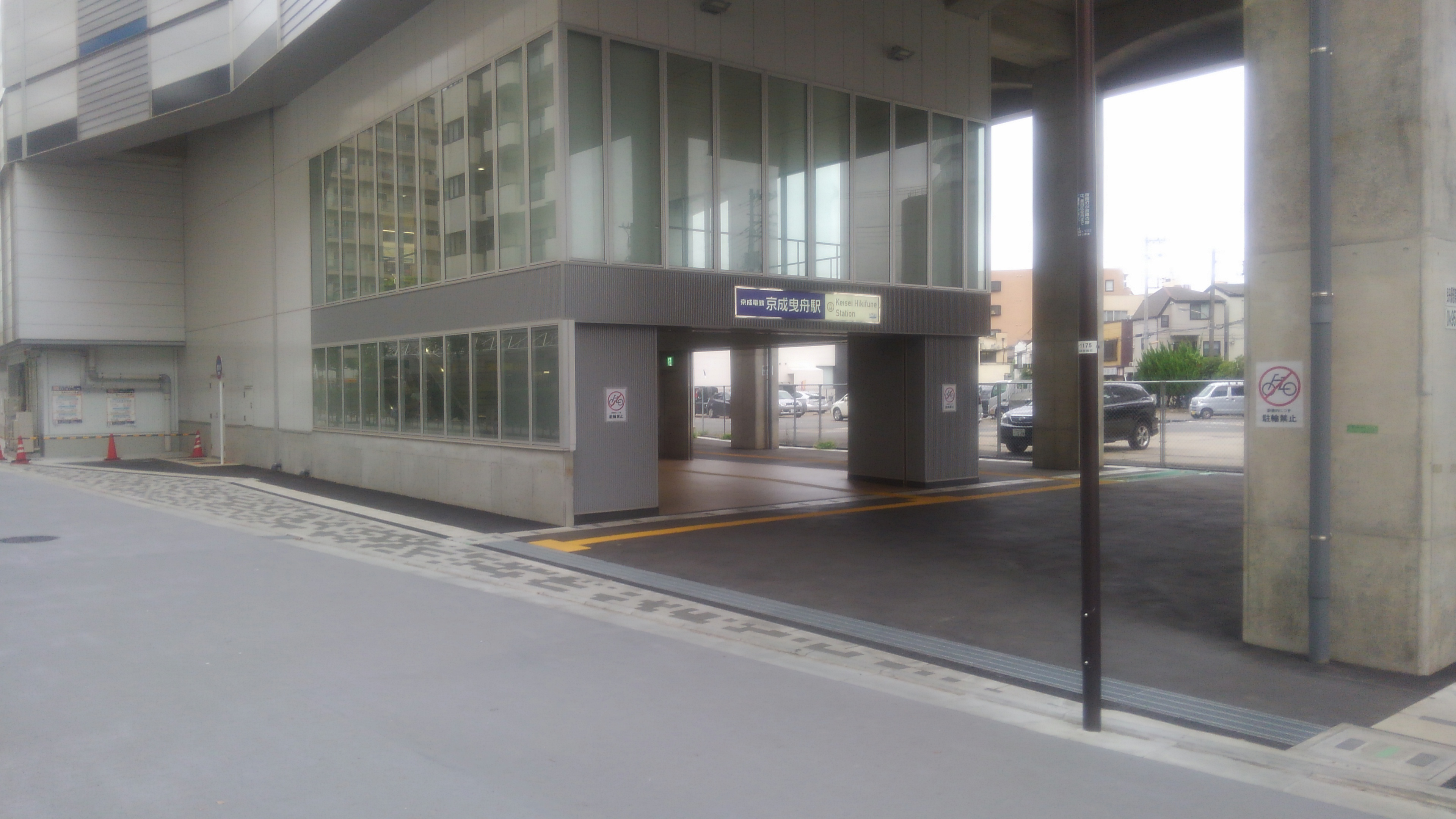 京成曳舟駅の西側出入口です。